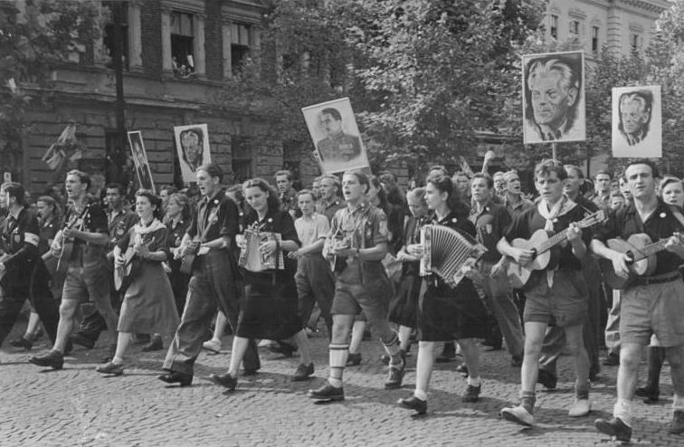 August 49-Internationale Studentenfestspiele in Budapest.UBz:Die Gruppe der Jugendlichen aus Österreich. Information added by Wikimedia users.